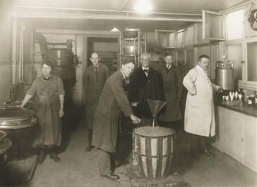 Verksamhet i laboratorium på Apoteket Nordstiernan